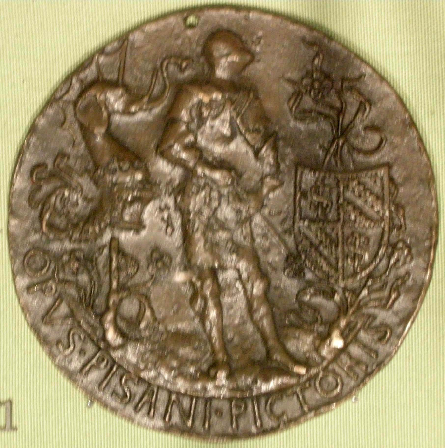 Pisanello, medaglia di sigismondo malatesta, verso, 1445